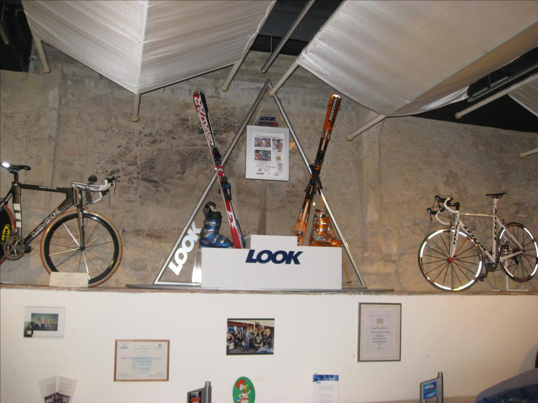 L'intérieur du Palais Ducal de Nevers : l'expo permanente